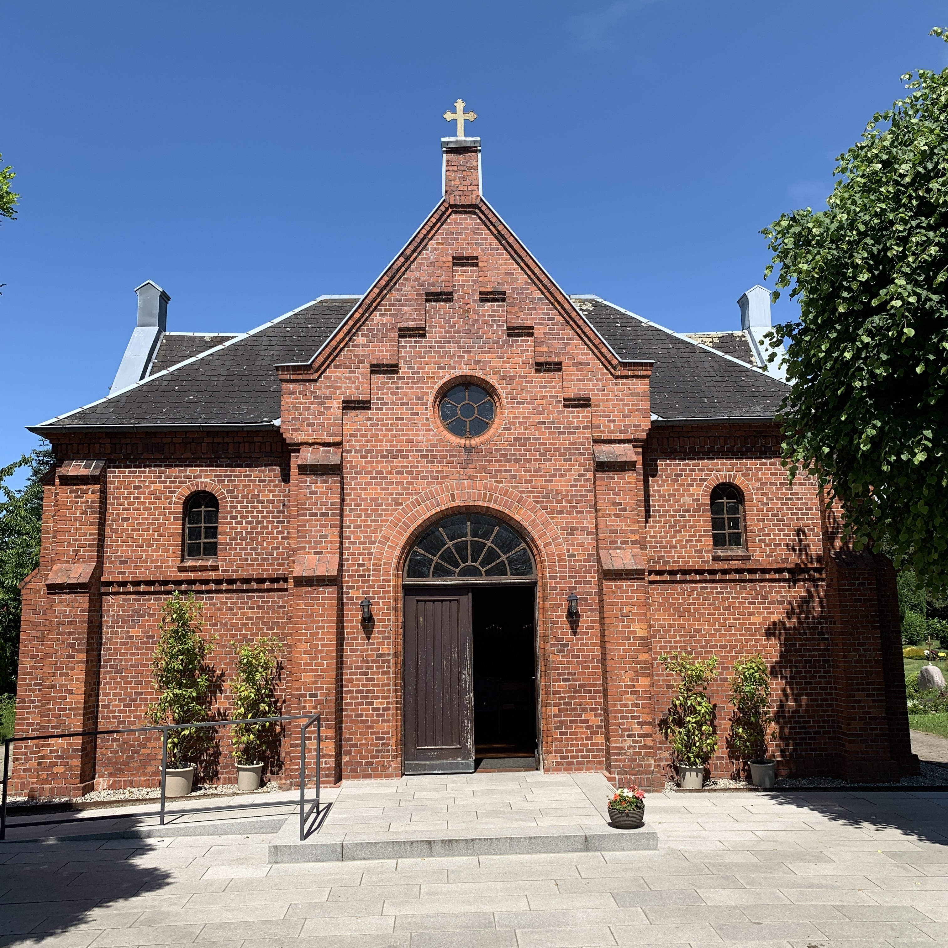 Friedhofskapelle in Rendsburg